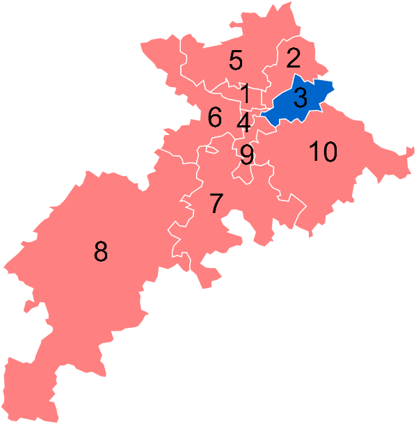 Résultats des élections législatives de Haute-Garonne en 2012